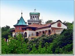 Замъка в с.Божичен